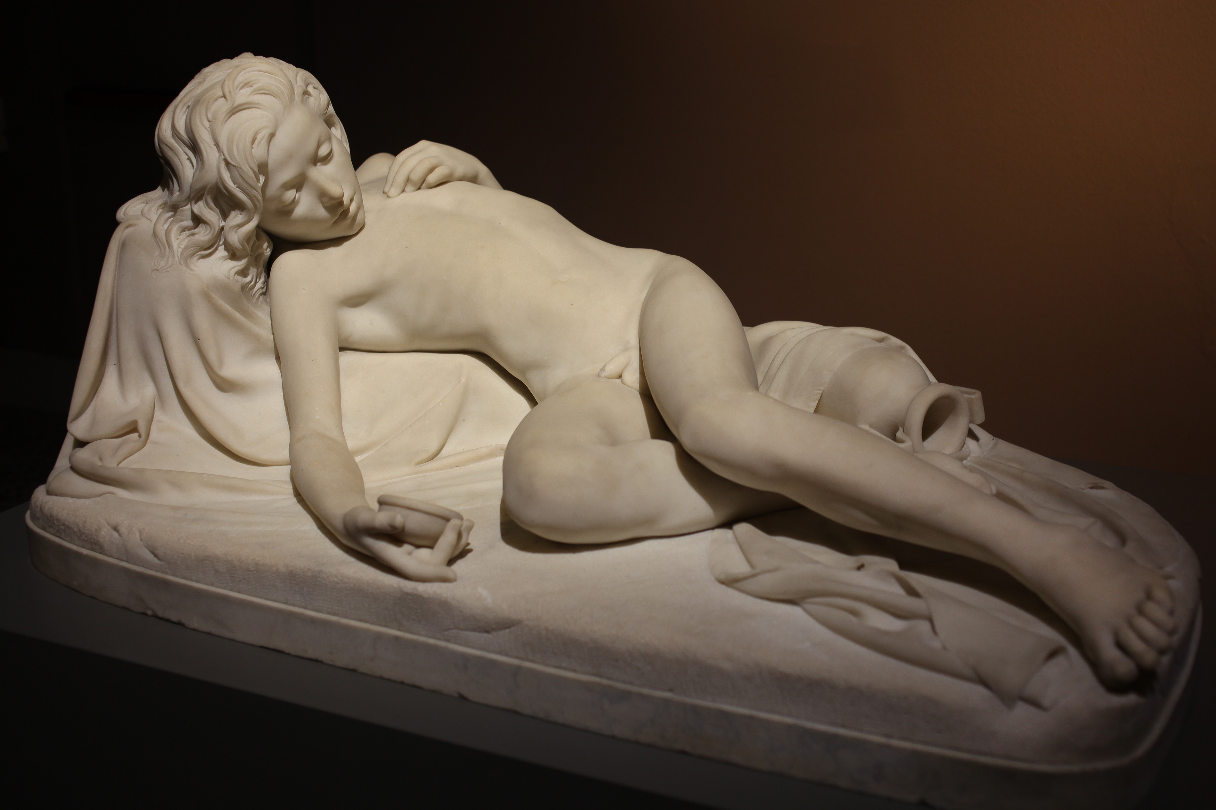 Giovanni Strazza (1818-1875), Ismaele abbandonato nel deserto (1844-1846)